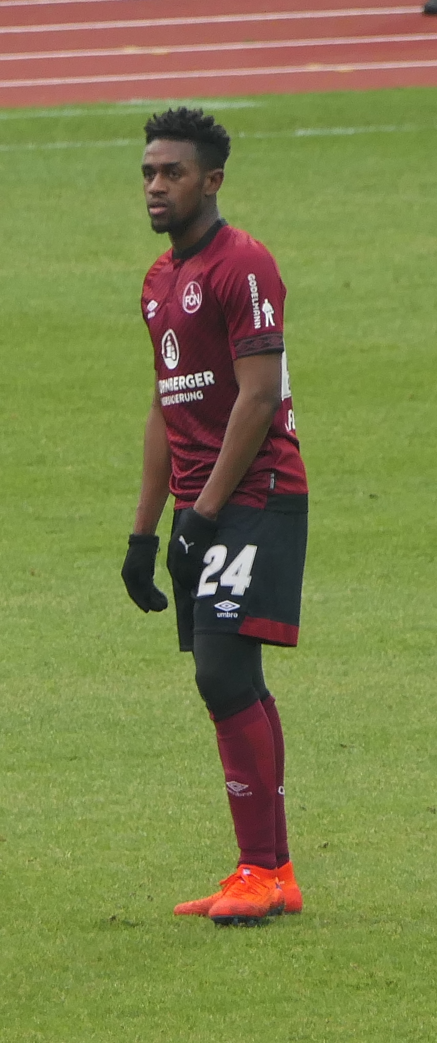 Der Fussballprofi Virgil Misidjan vom 1.FC Nürnberg beim Heimspiel gegen Werder Bremen am 02.02.2019.